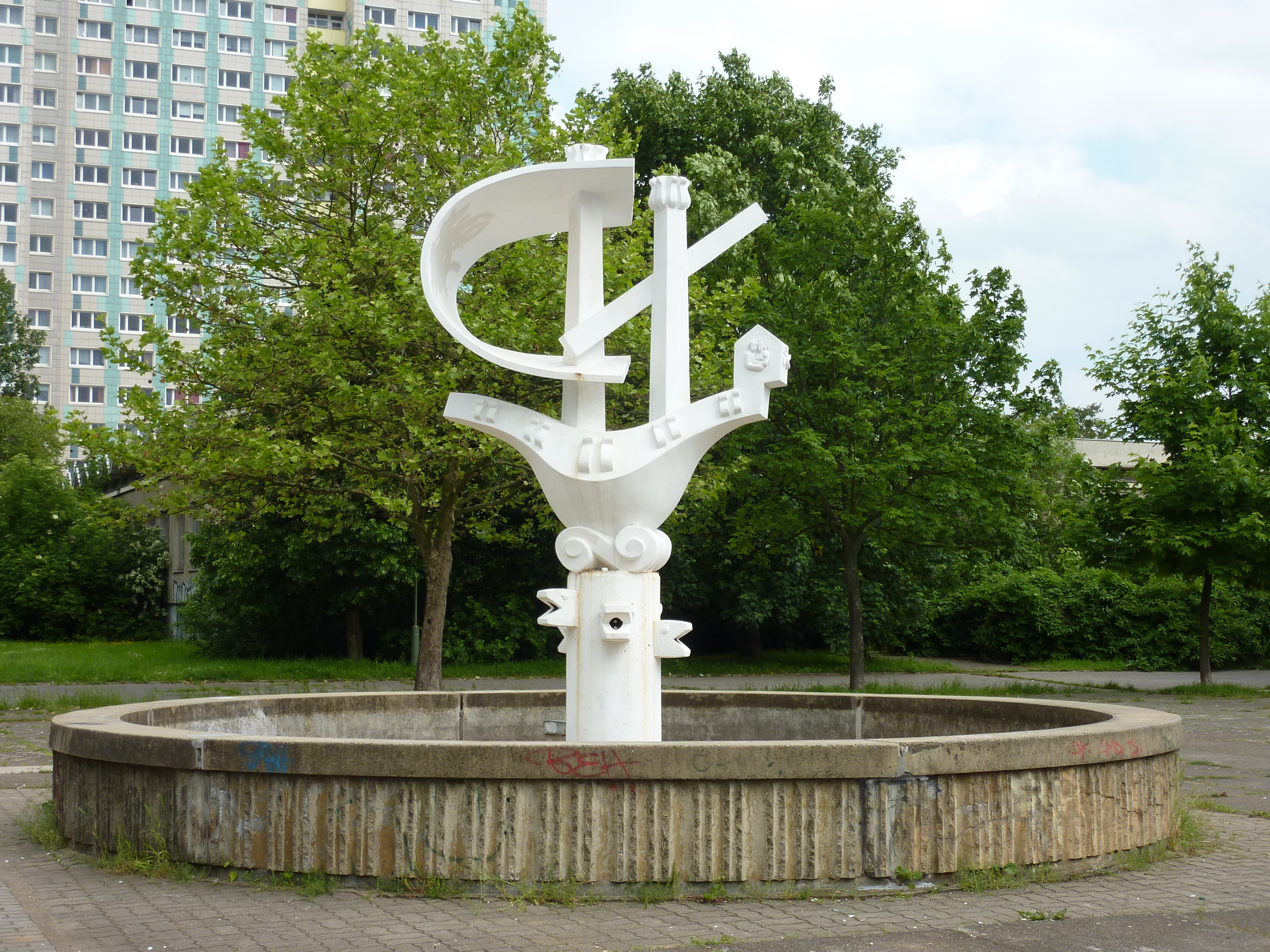 Koggebrunnen aus Beton von Nikolaus Bode aus dem Jahr 1982 im Gensinger Viertel in Berlin-Friedrichsfelde. Im Hintergrund das Hochhaus Alt-Friedrichsfelde 68, Blickrichtung Südosten.